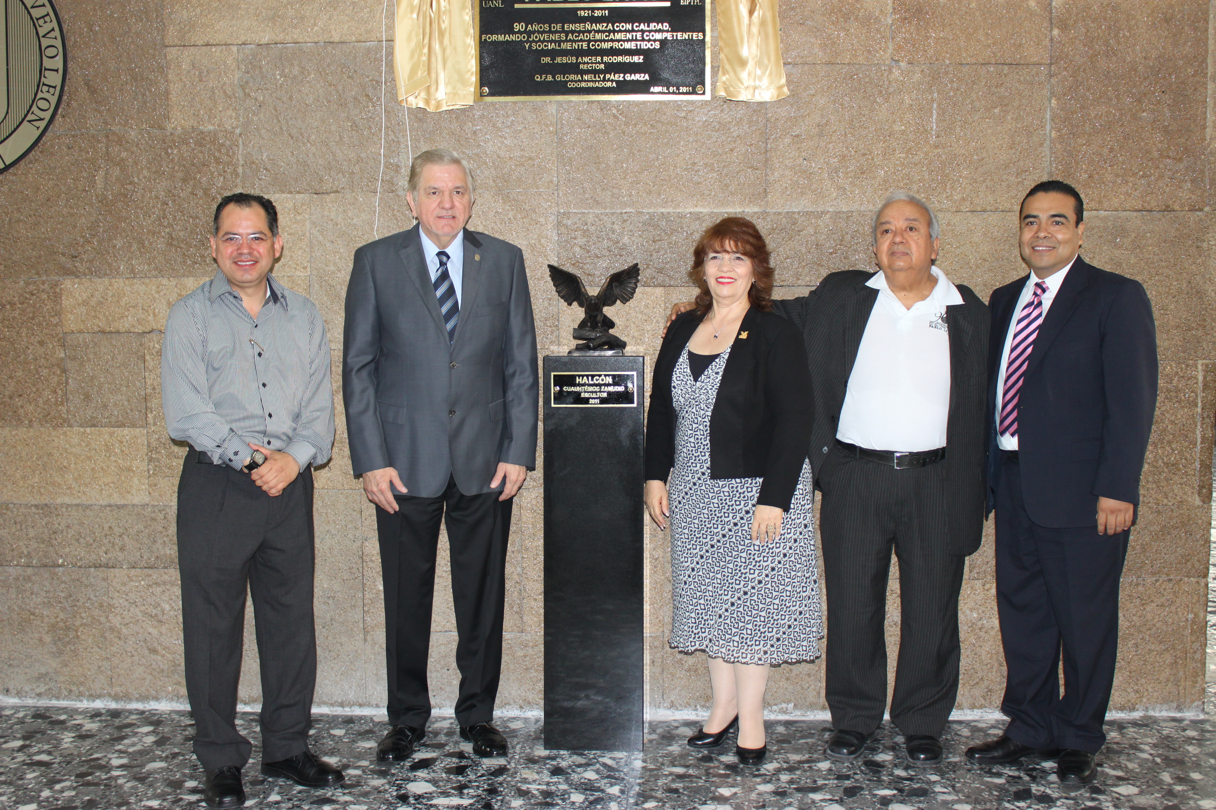 develacion de la placa y el halcon en el aniversario de la pablo livas de la uanl